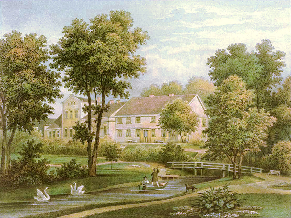 Gut Quakenburg (Quackenburg), Kreis Rummelsburg, Provinz Pommernz